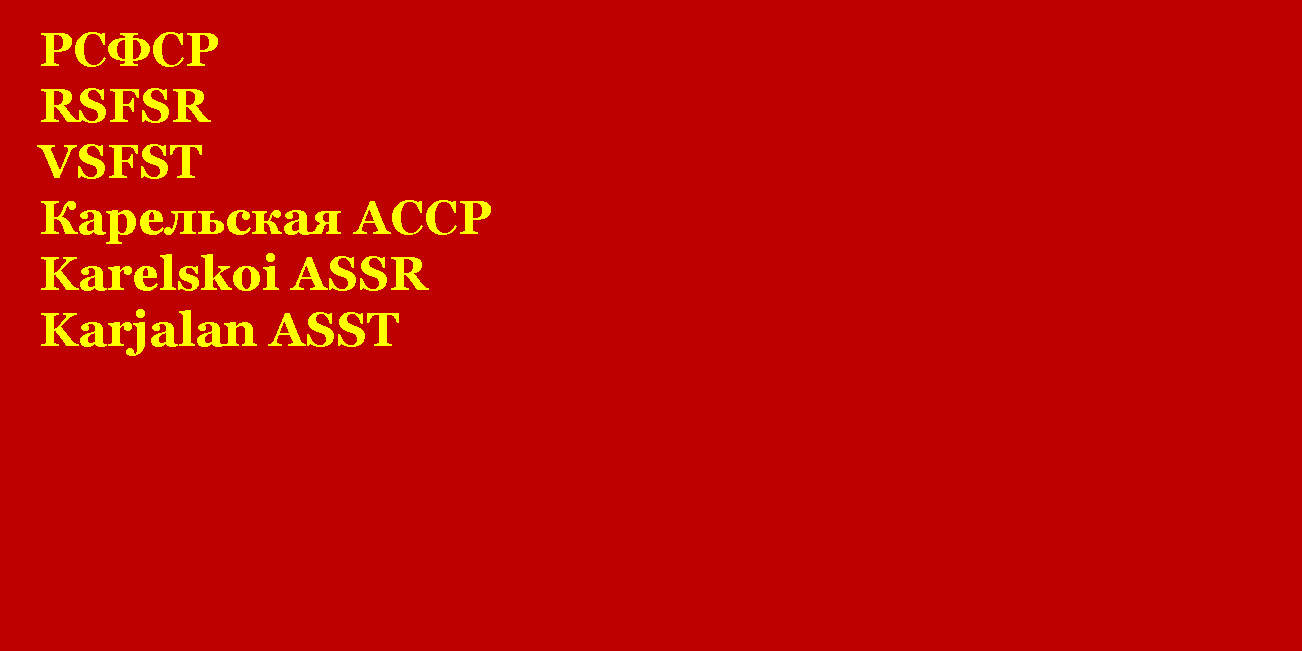 Флаг Карельской АССР в 1937 году